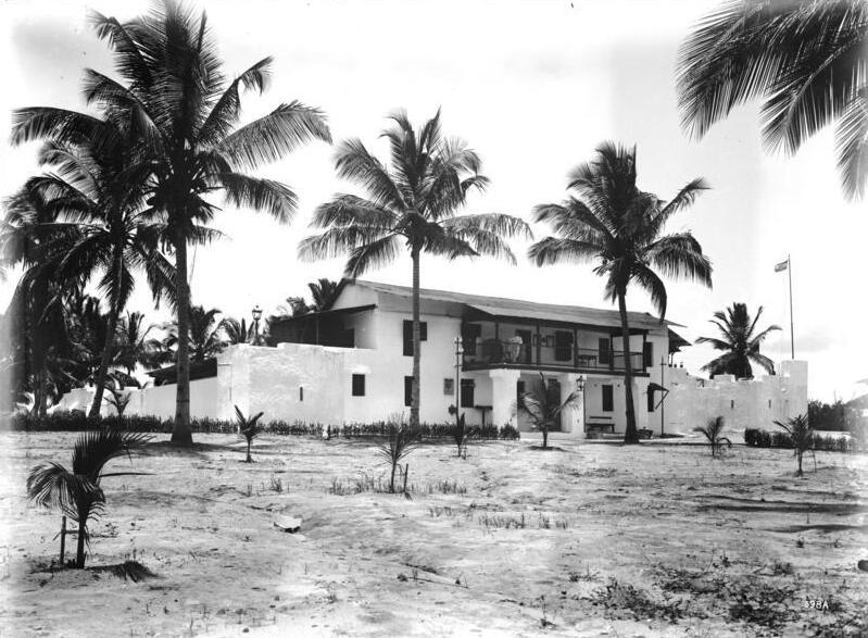 Sadani, Boma